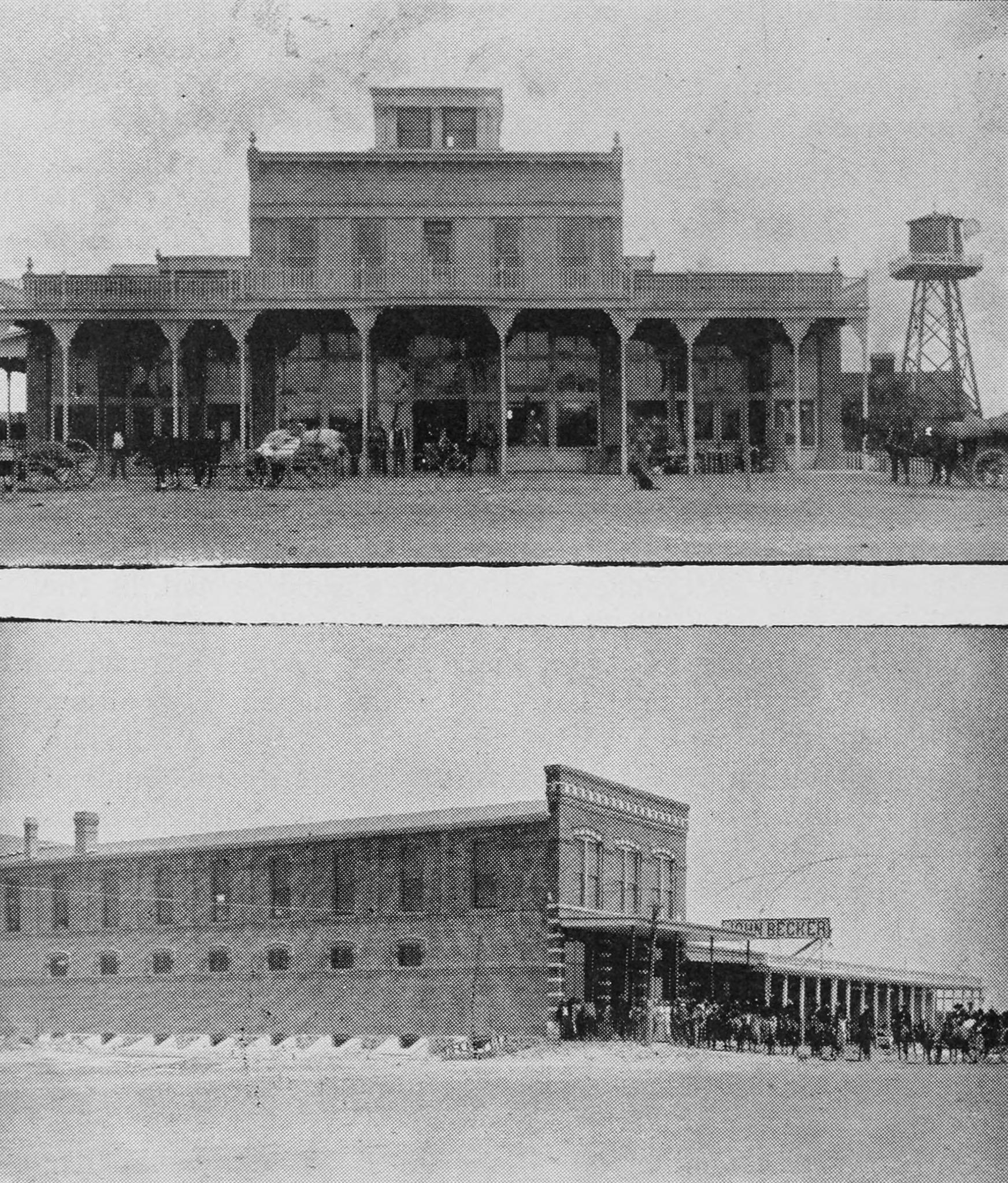 Belen, New Mexico